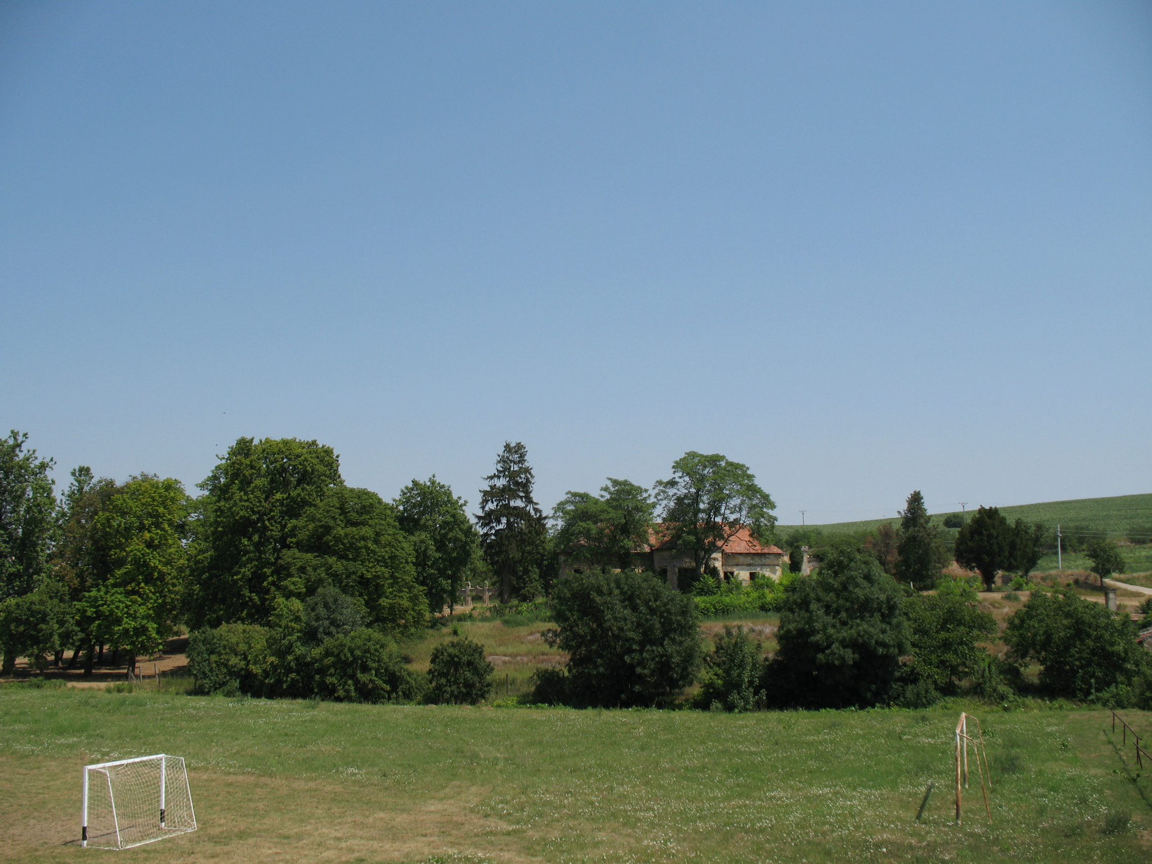 Sárkányfalva az egykori Renner kúria, előtte focipálya